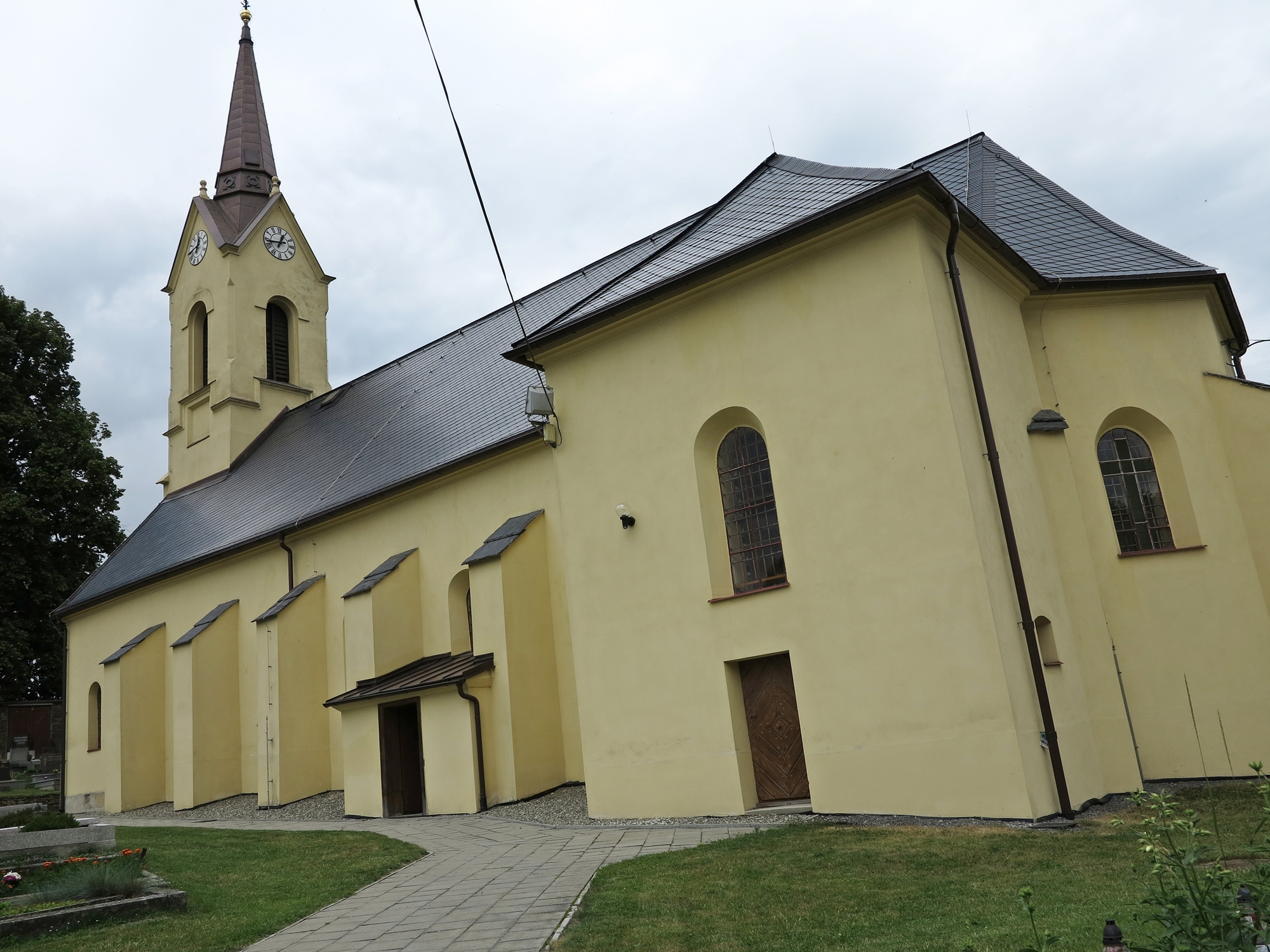 Kostel Narození Panny Marie, Radkov (okres Opava).